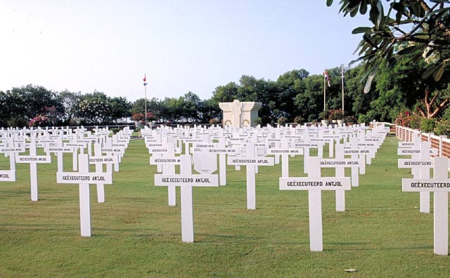 Ereveld Ancol